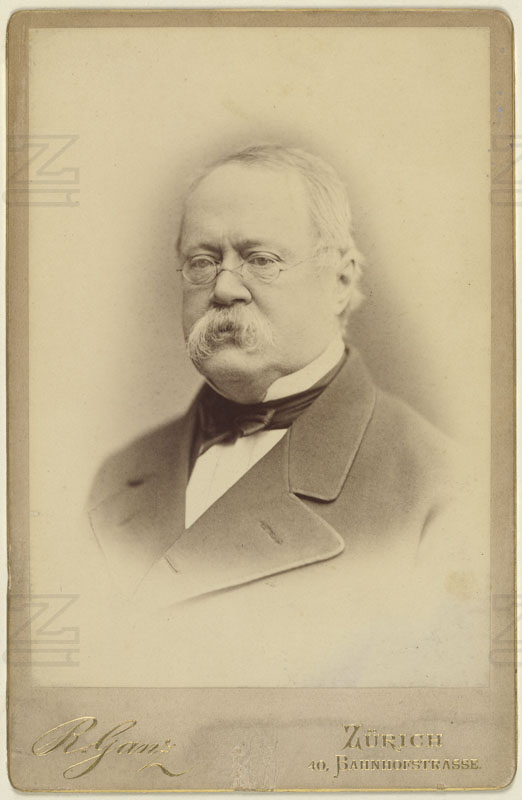 Friedrich Paul David Buerkli. Bild 14 x 9,7 cm, Blatt 16,5 x 10,8 cm